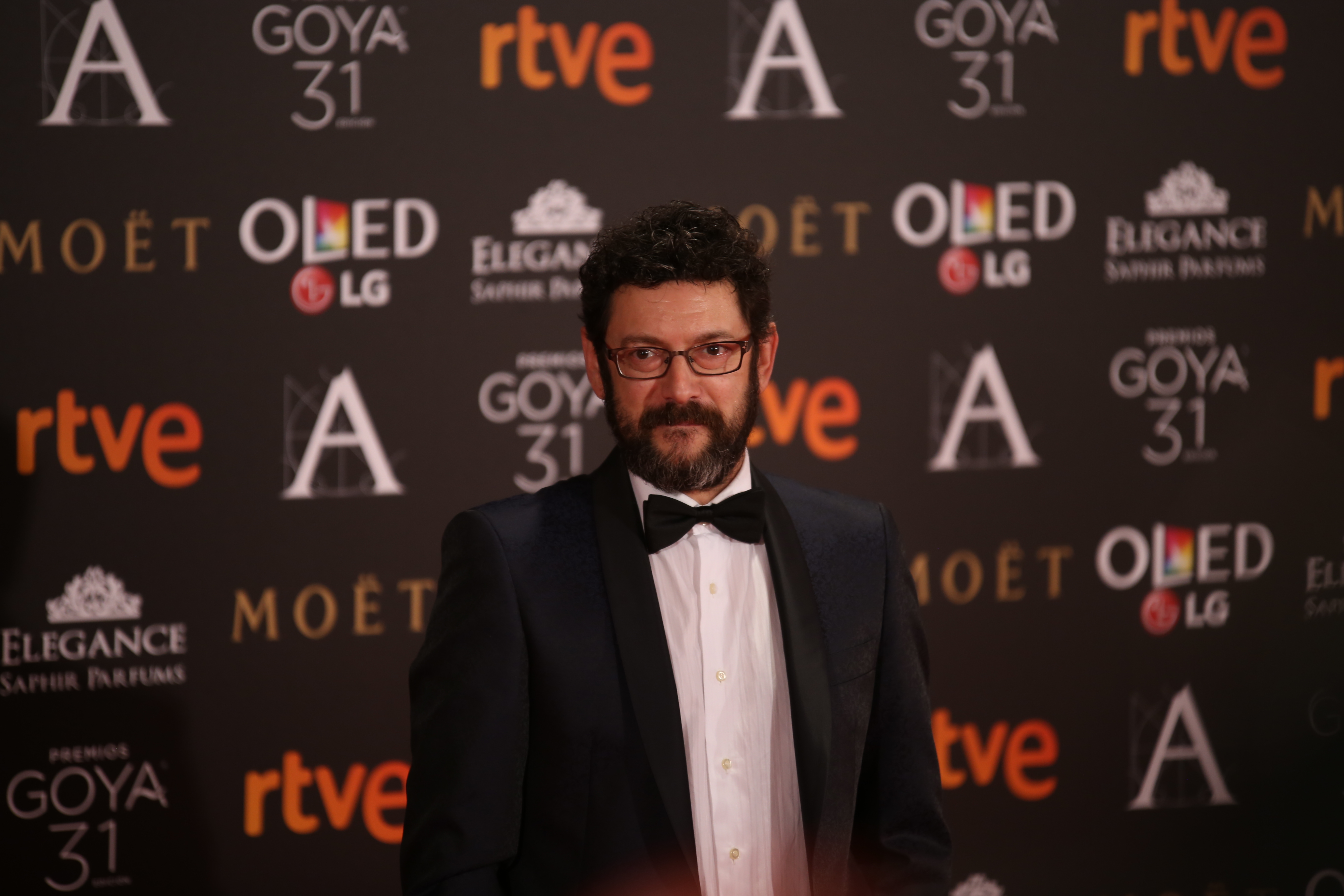 Premios Goya 2017